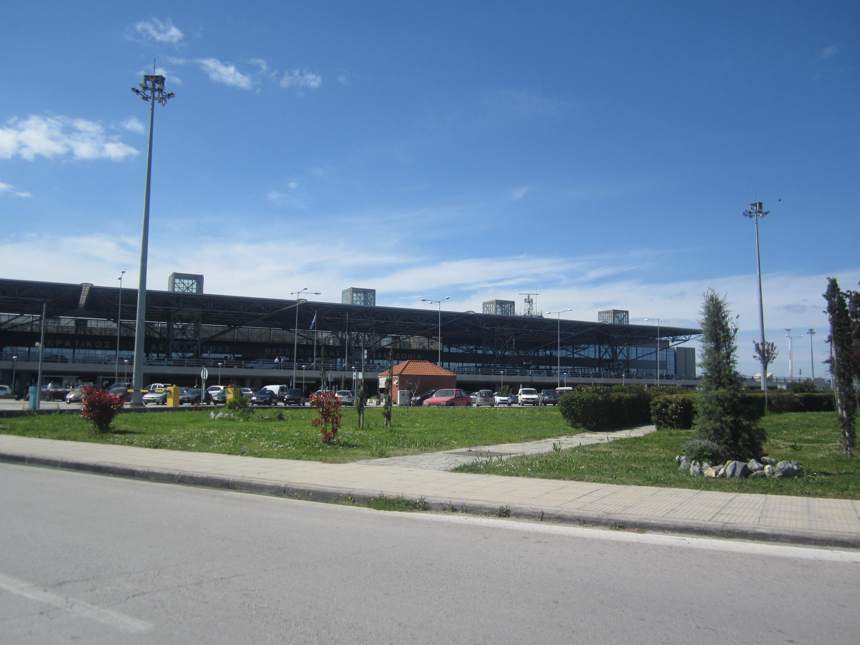 aeroporto di salonicco